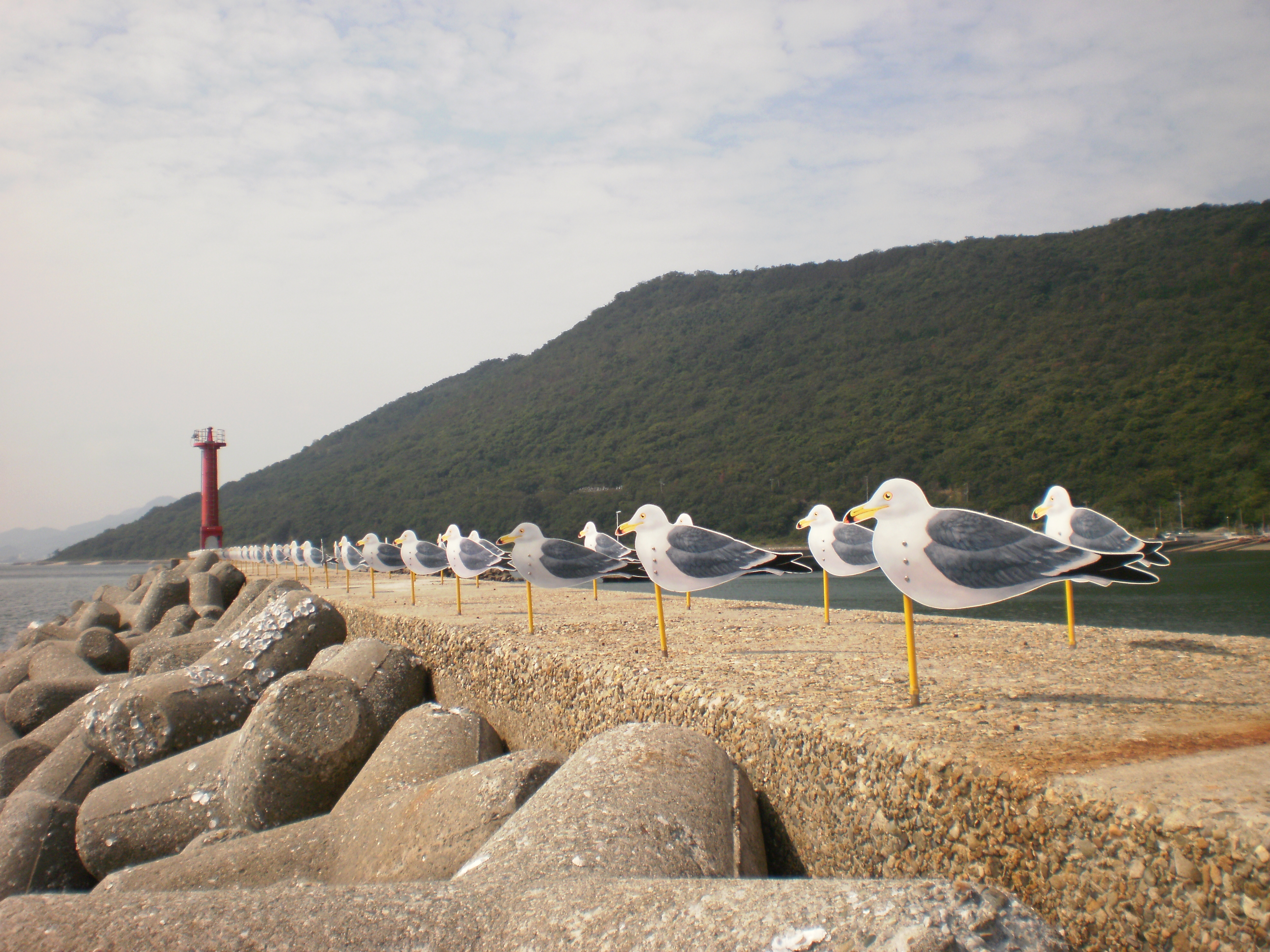 カモメの駐車場 女木島